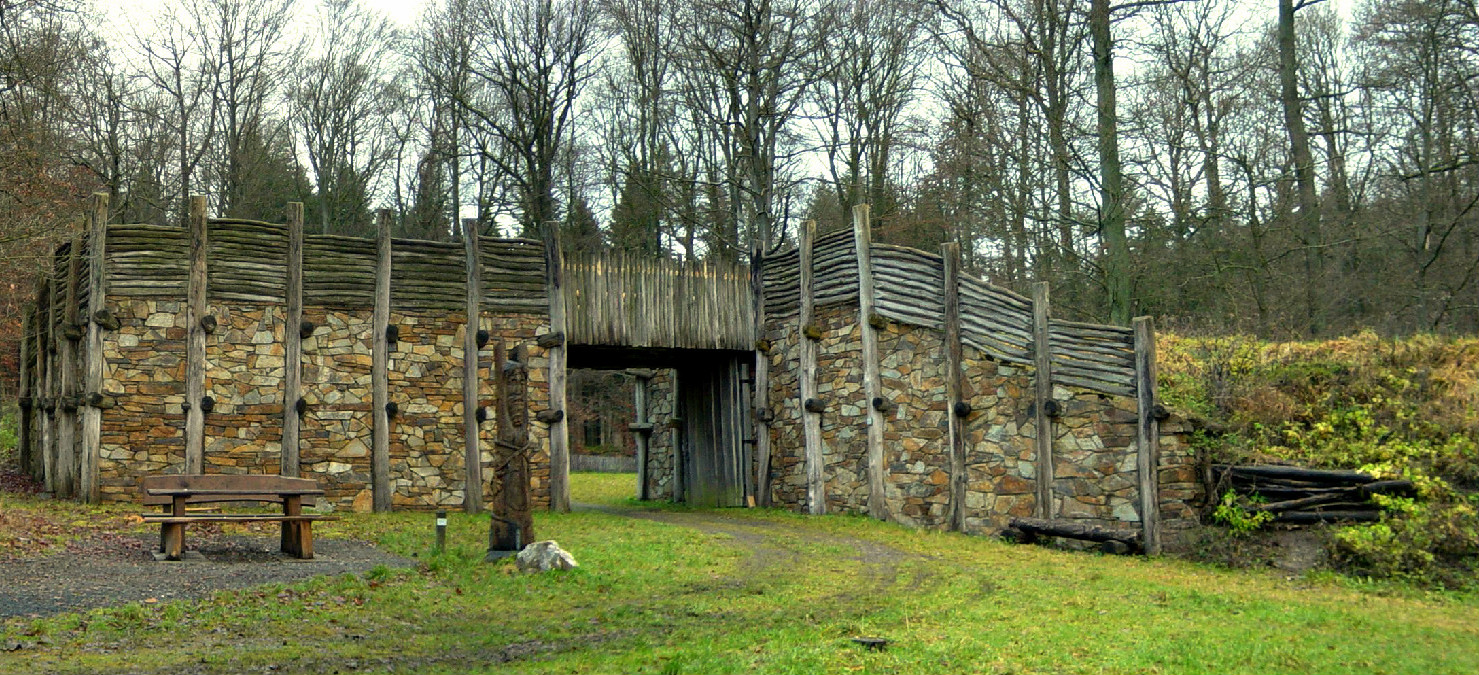 "Keltentor. In den drei um den Berg verlaufenden Ringwällen sind 14 Eingangstore zu erkennen, die als Zangentor oder als Tangentialtor ausgebildet waren. Eine Toranlage als freie Rekonstruktion eines keltischen Tangentialtores ist 2001/2002 nachgebaut worden. Die Toranlage ist am höchsten Punkt ca. 5.30 m hoch. An die Außenmauern schließen sich ca. 3,5 m hohe Erdwälle an." (Hinweistafel), Vorderseite